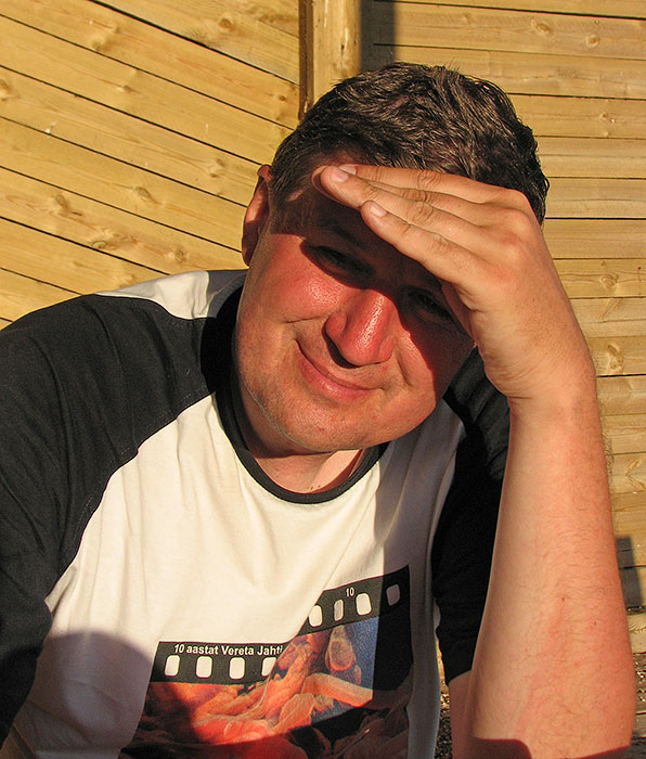 Eesti bioloog ja loodusfotograaf Urmas Tartes.